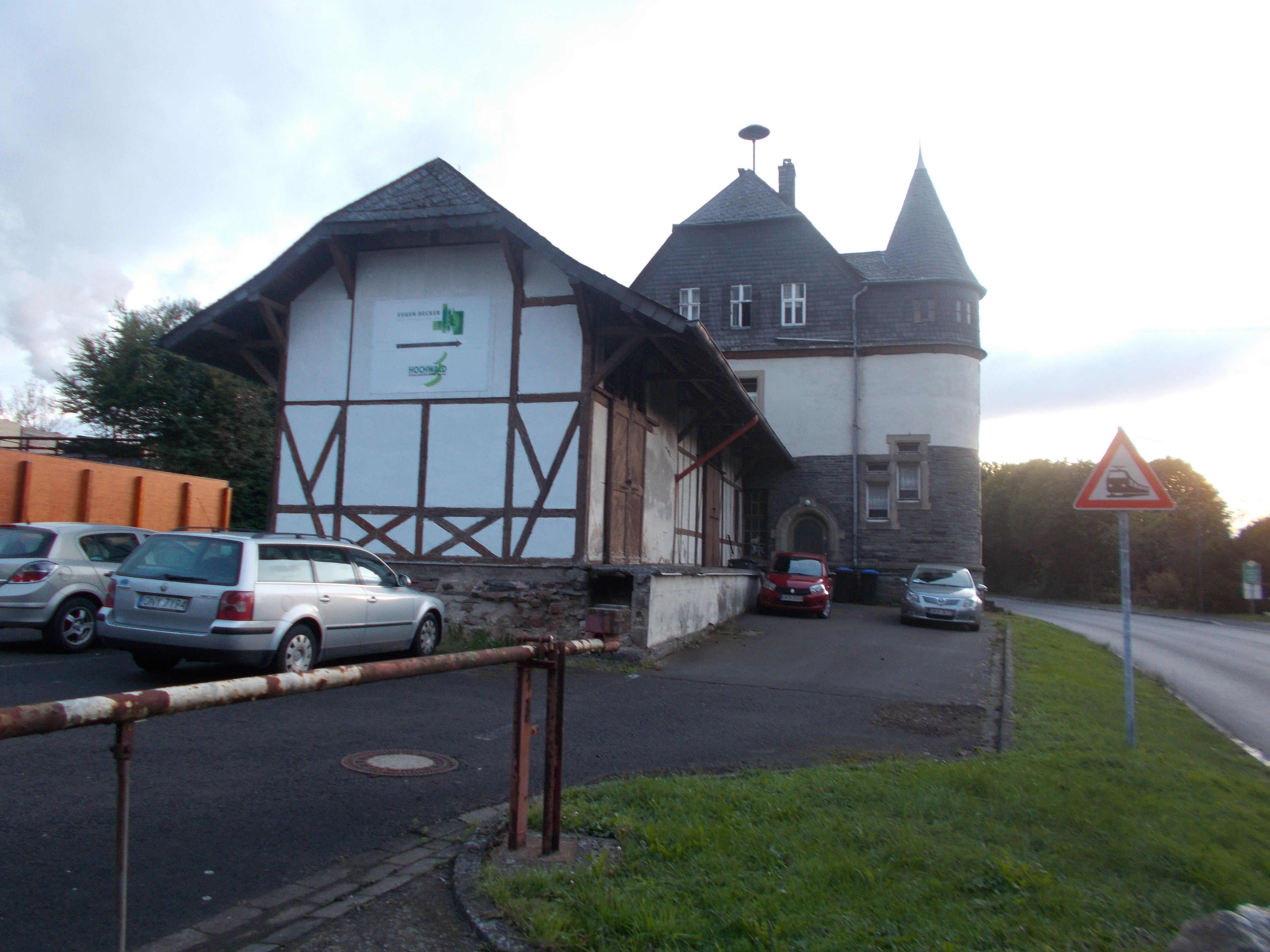 Typenbau, Krüppelwalmdach, Fachwerk-Güterschuppen, Anfang des 20. Jahrhunderts